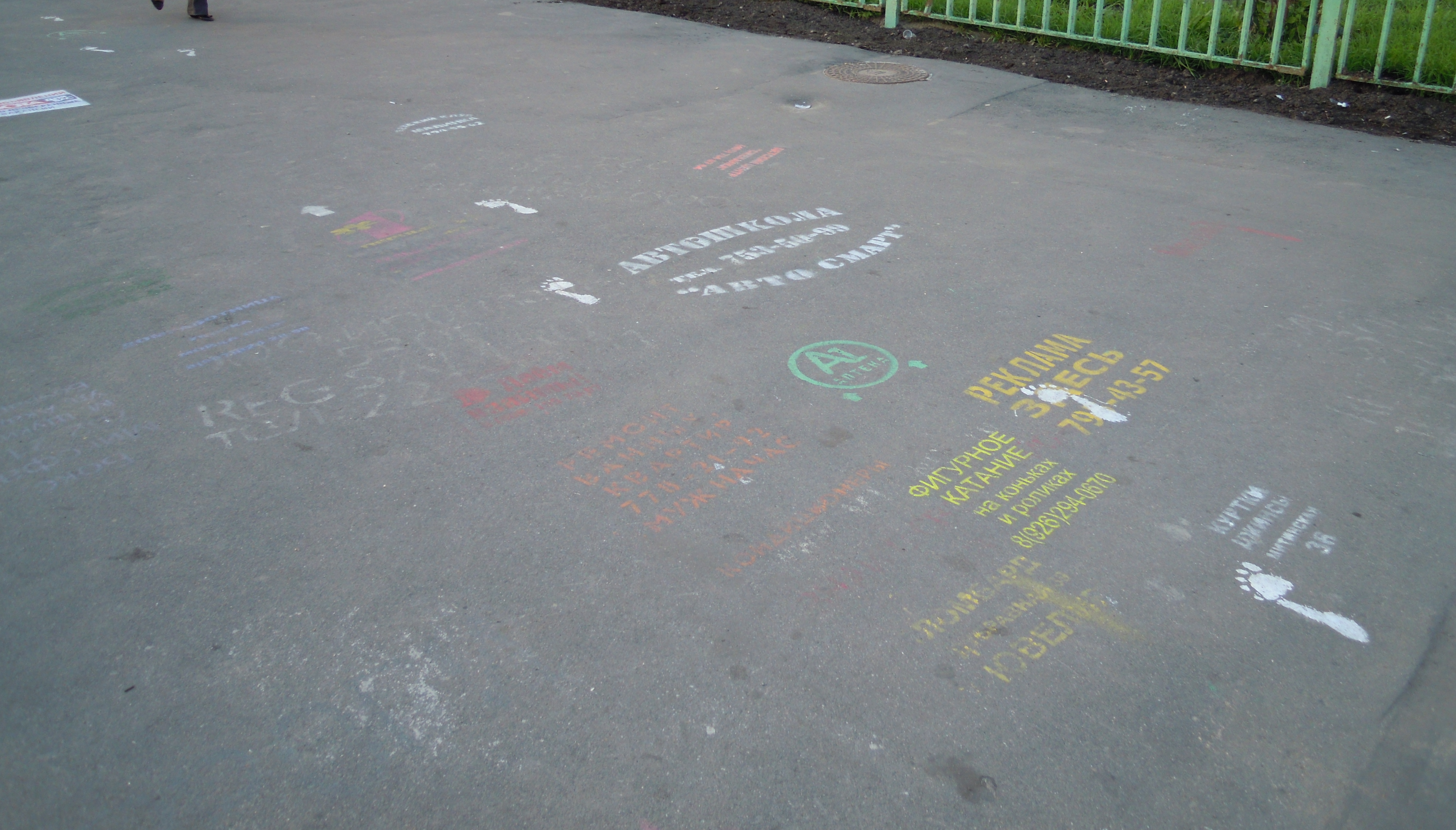 La strato Mitinskaja. Reklamo sur la porhoma vojo (trotuaro) antaŭ subterfervoja elirejo. Vidu informon pri tia reklamo el la jaro 2010-a en Vikinovaĵoj.